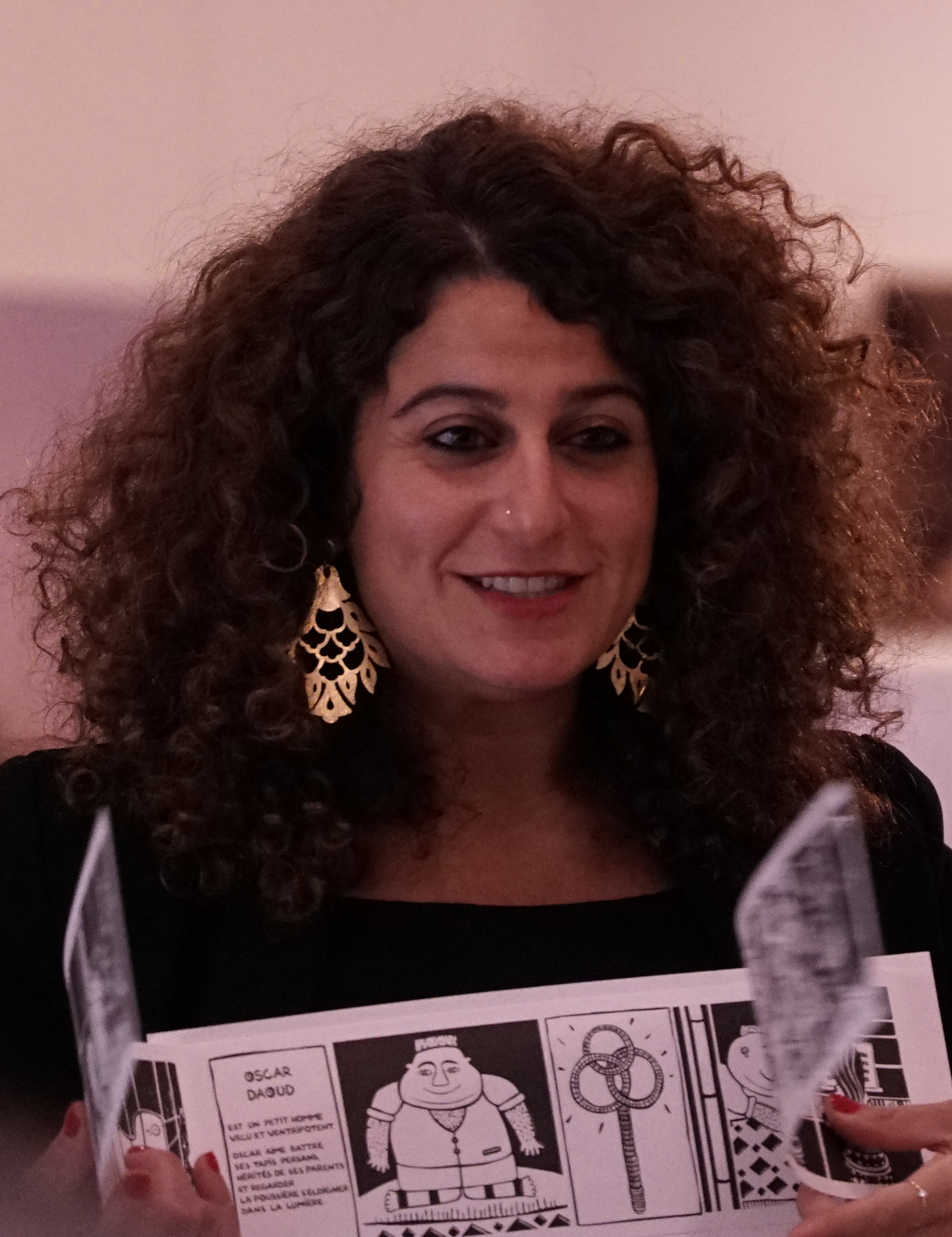 lors du festival Interbibli en la médiathèque Croix Rouge à Reims.